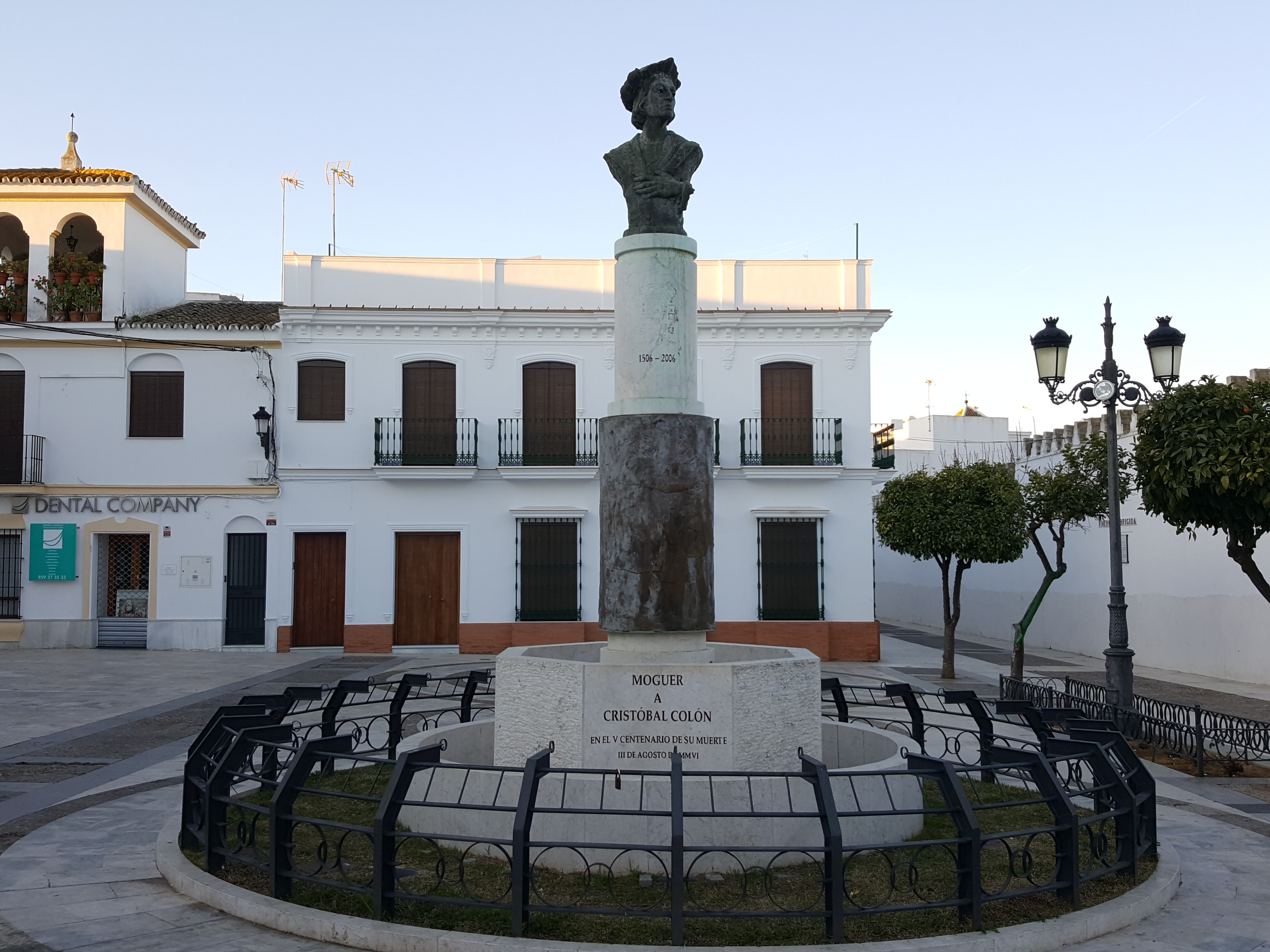 Monumento a Cristóbal Colón en Moguer Andalucía (España). Entorno del monumento.